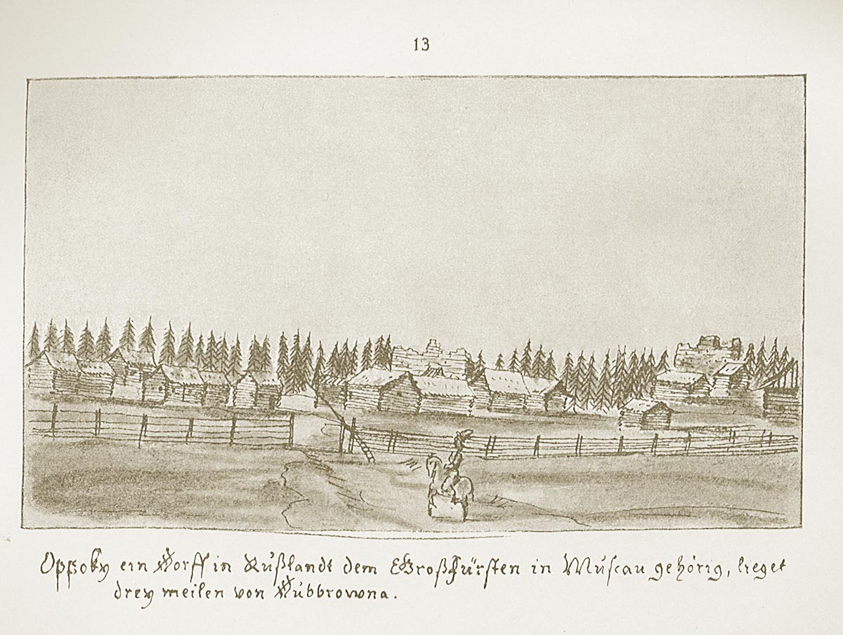 Опоки